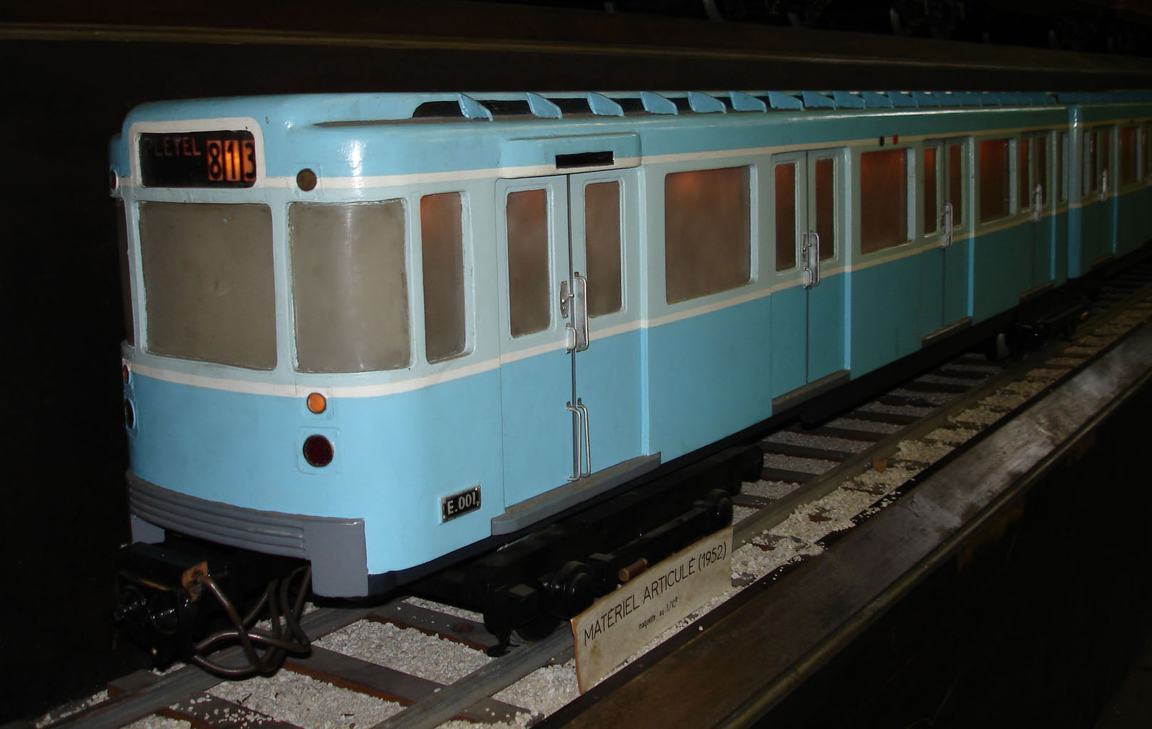 Maquette du MA 51 (matériel articulé) Journées du patrimoine le 15/09/2007 à l'AMTUIR, Colombes, France Photo personnelle (own work) de Clicsouris